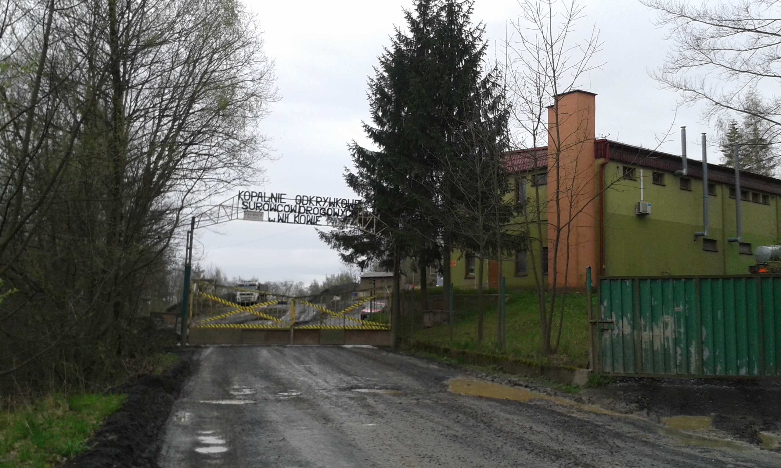 Brama kopalni w Wilkowie.